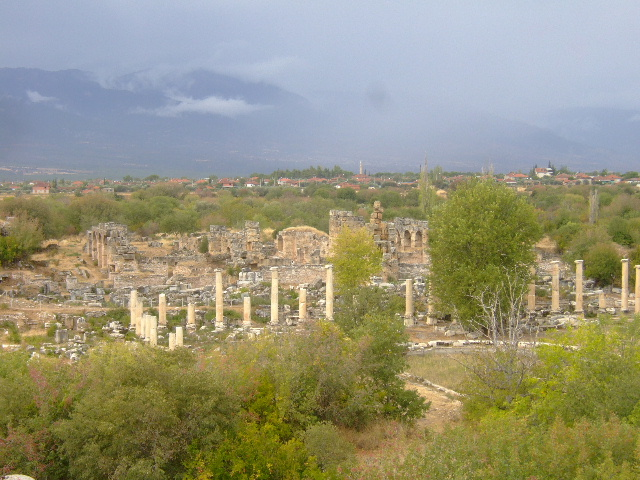 Aphrodisias: Aphrodite Tempel (Mitte)